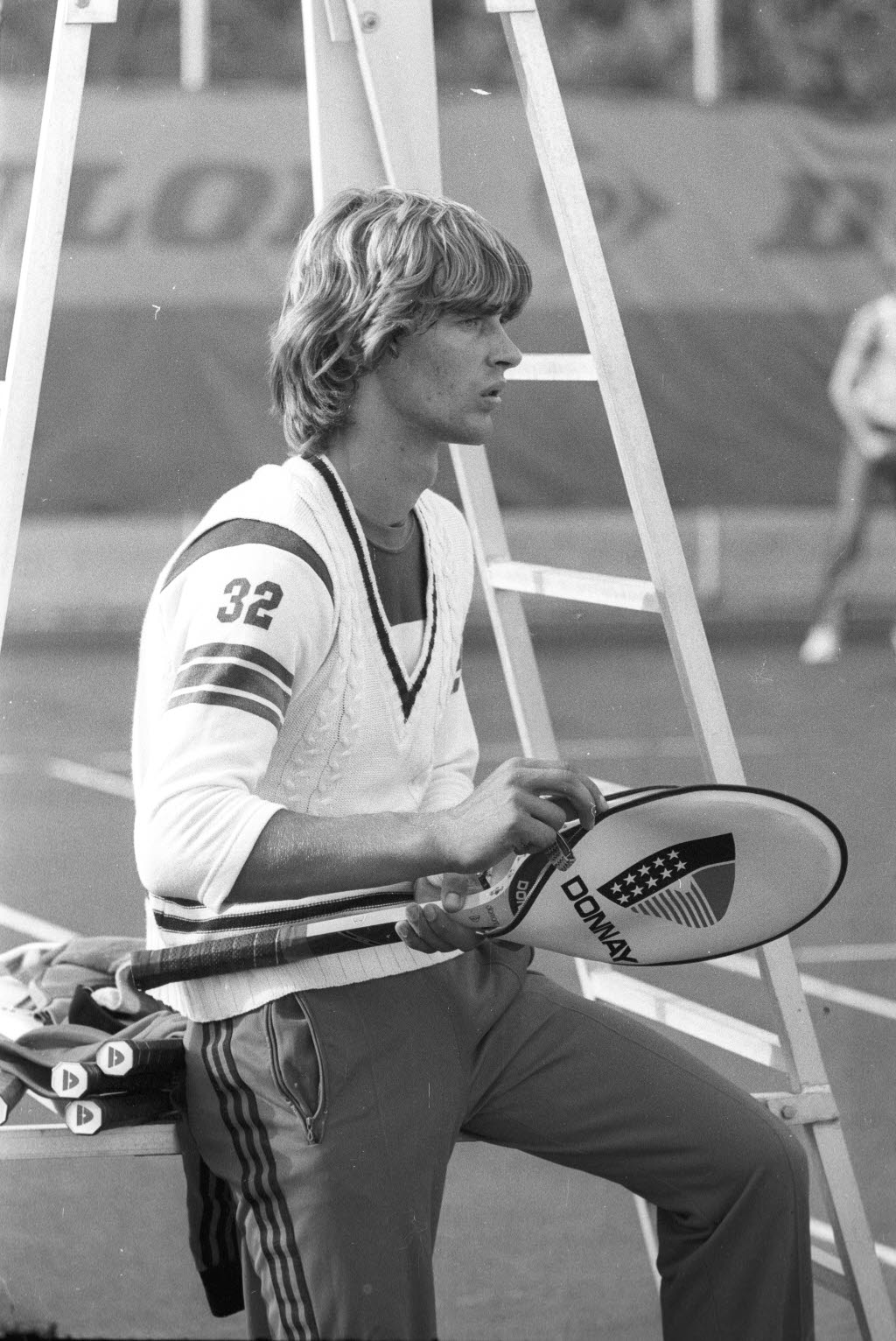 auf der Anlage des 1. Kieler Hockey- und Tennis-Clubs am Kopperpahler Teich 27. Im Bild Tennisspieler Klaus Eberhard.